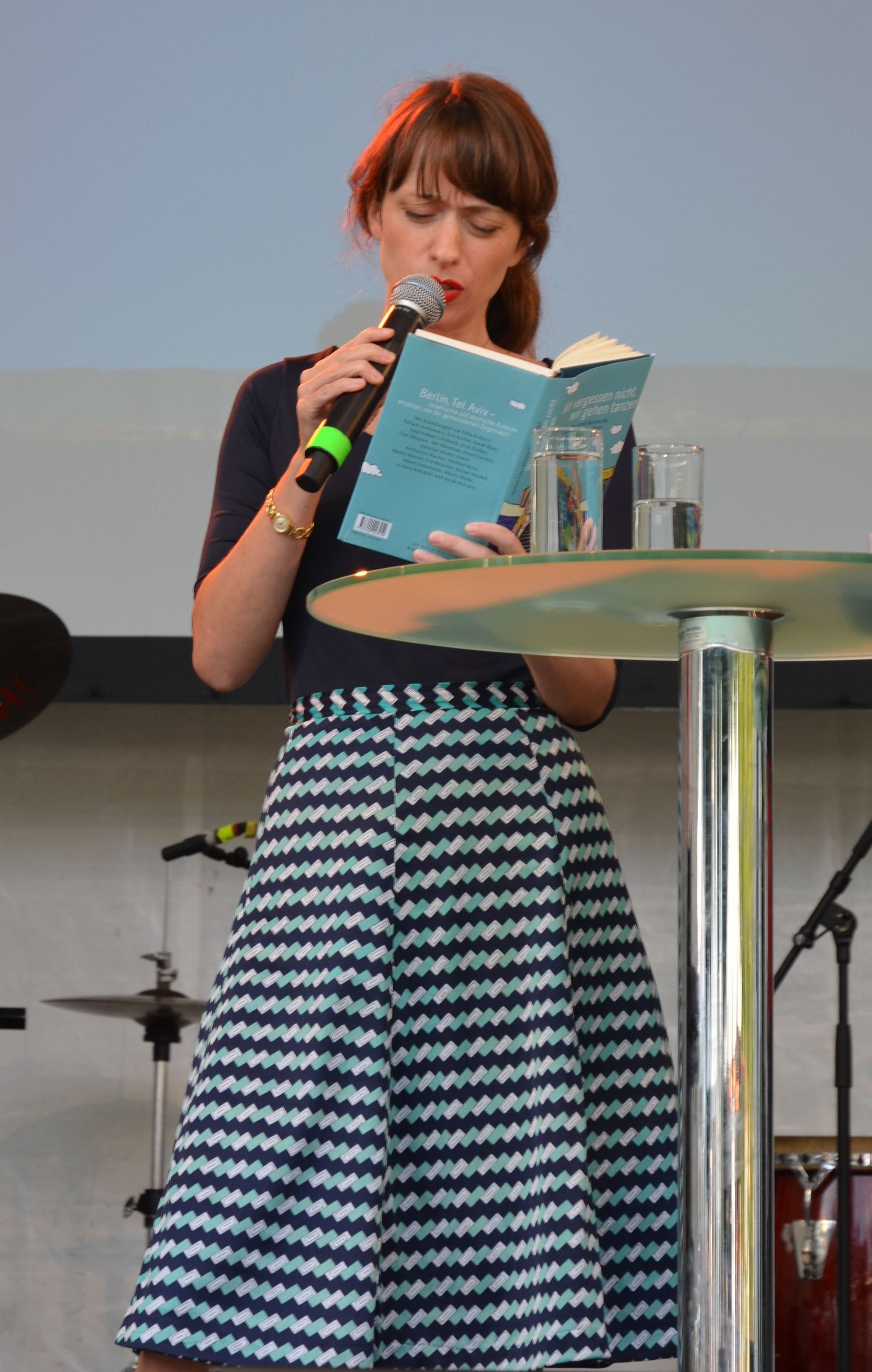 Sarah Stricker bei einer Lesung während des Bürgerfests des Bundespräsidenten am 11. und 12.9.2015 im Schloss Bellevue